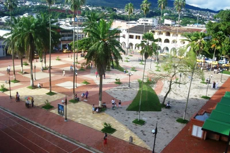 Plaza Pizarro (antes Parque Santander) de Florencia, Caquetá, Colombia